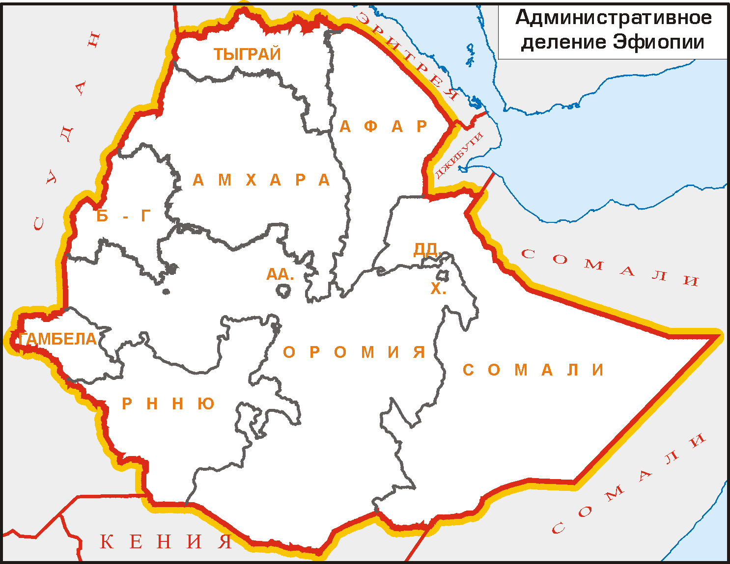 Федеративное устройство Эфиопии.